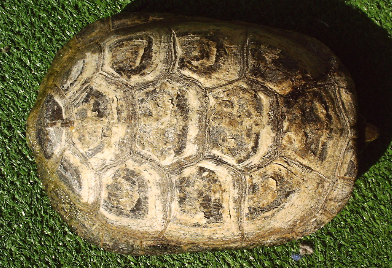 Emys orbicularis carapax upside